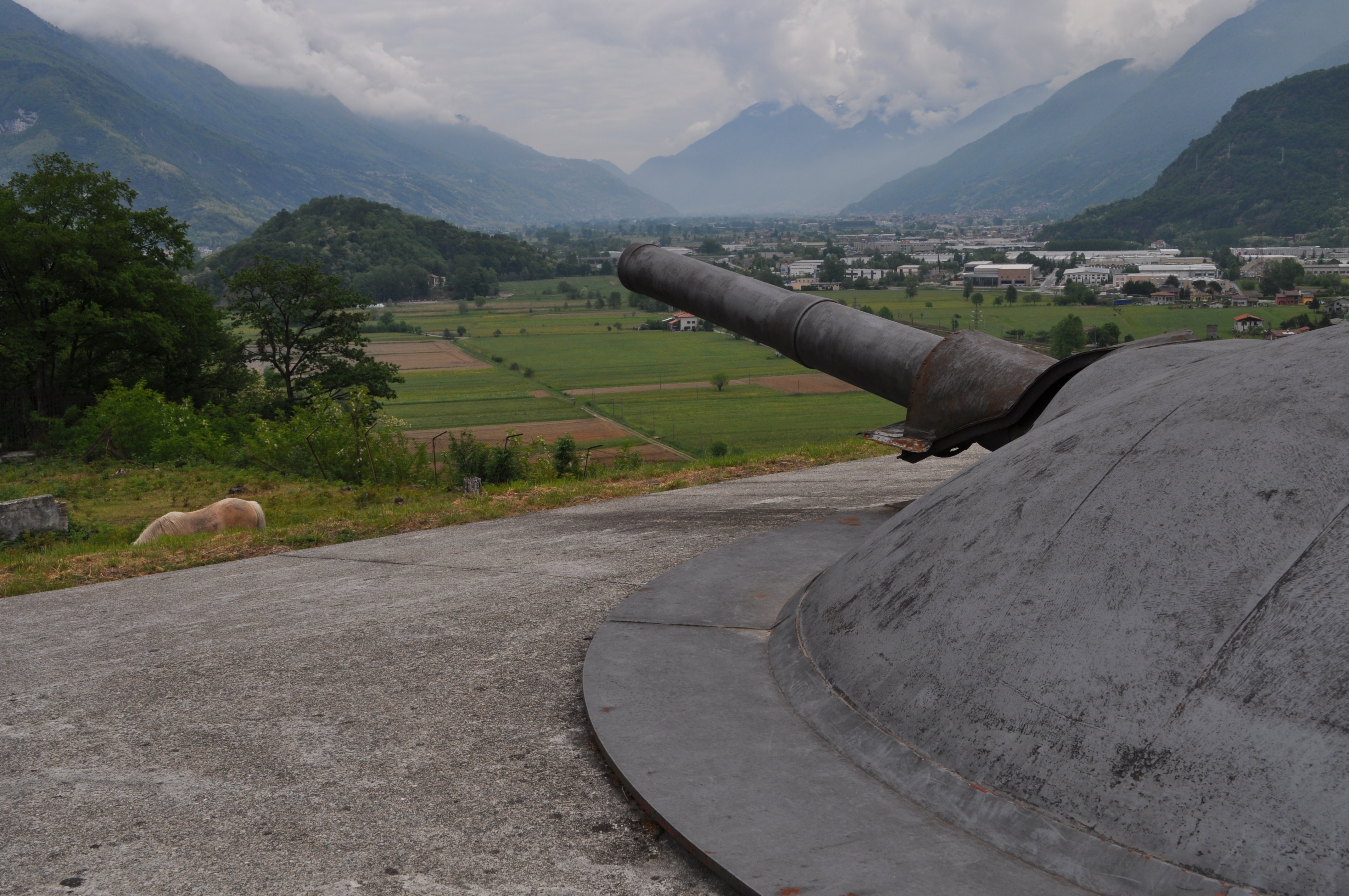 Canna di un pezzo da 149/35 in cupola corazzata in batteria, Forte Montecchio-Lusardi